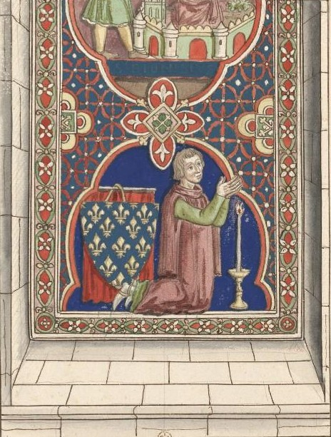 Louis de France, fils de Saint Louis